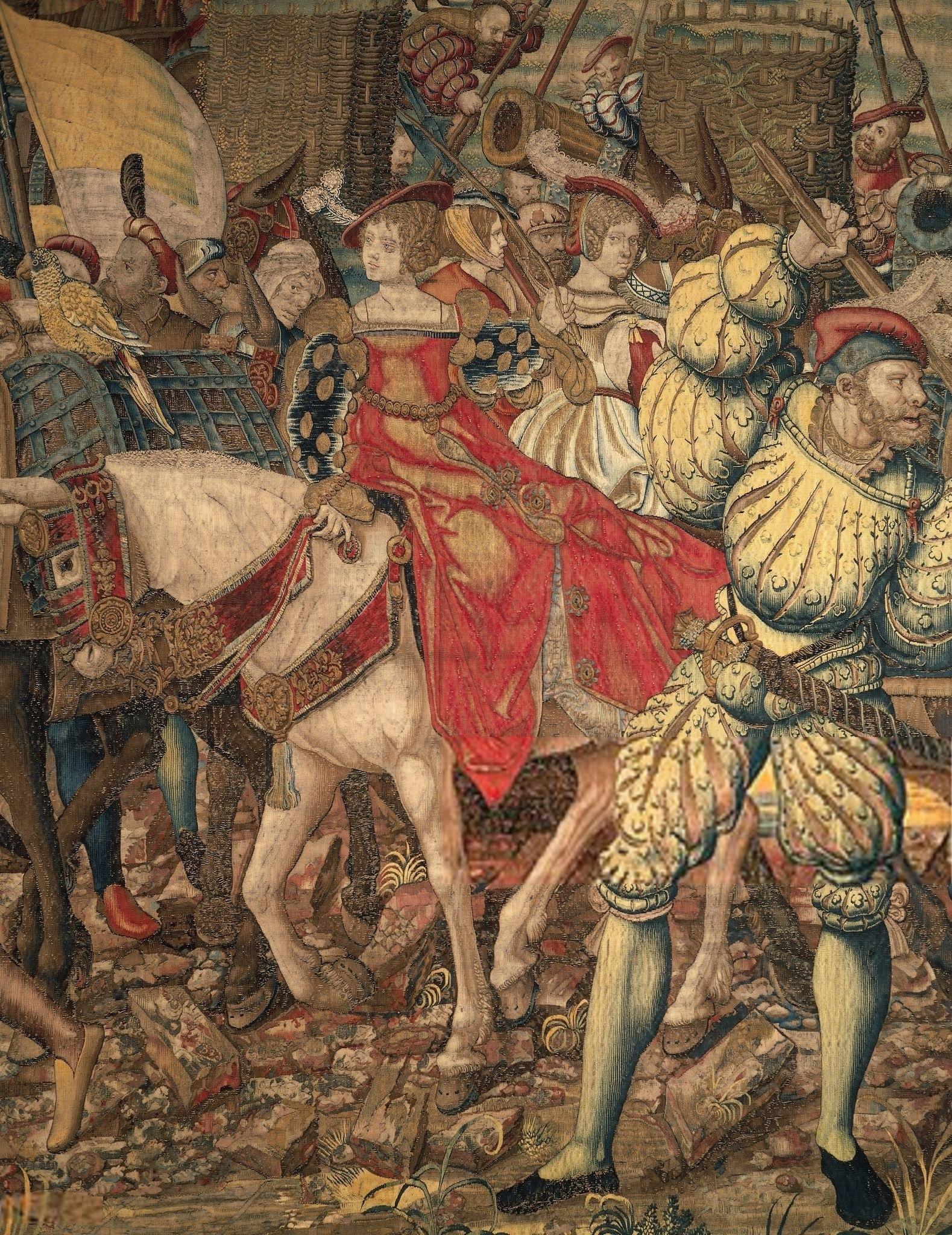 Arazzi Battaglia Pavia - Dama in rosso